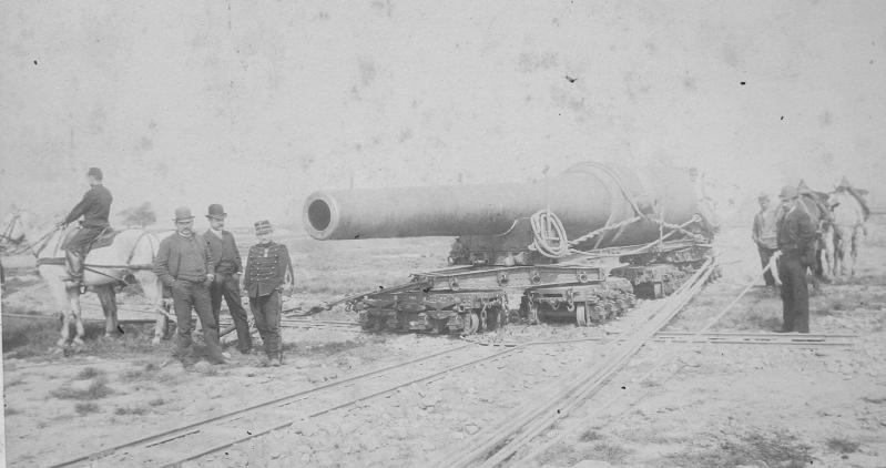 Prosper Charles Marie Péchot - Étude sur la stabilité des trains et les chemins de fer à voie de 0m,60 - Système de 4 wagons à 4 essieux portant un canon de 32cm passa-tir sur une plaque tournante de 1m,70 de diamètre. (le ler wagon vient de tourner et de inwser sur la plaque tournante).